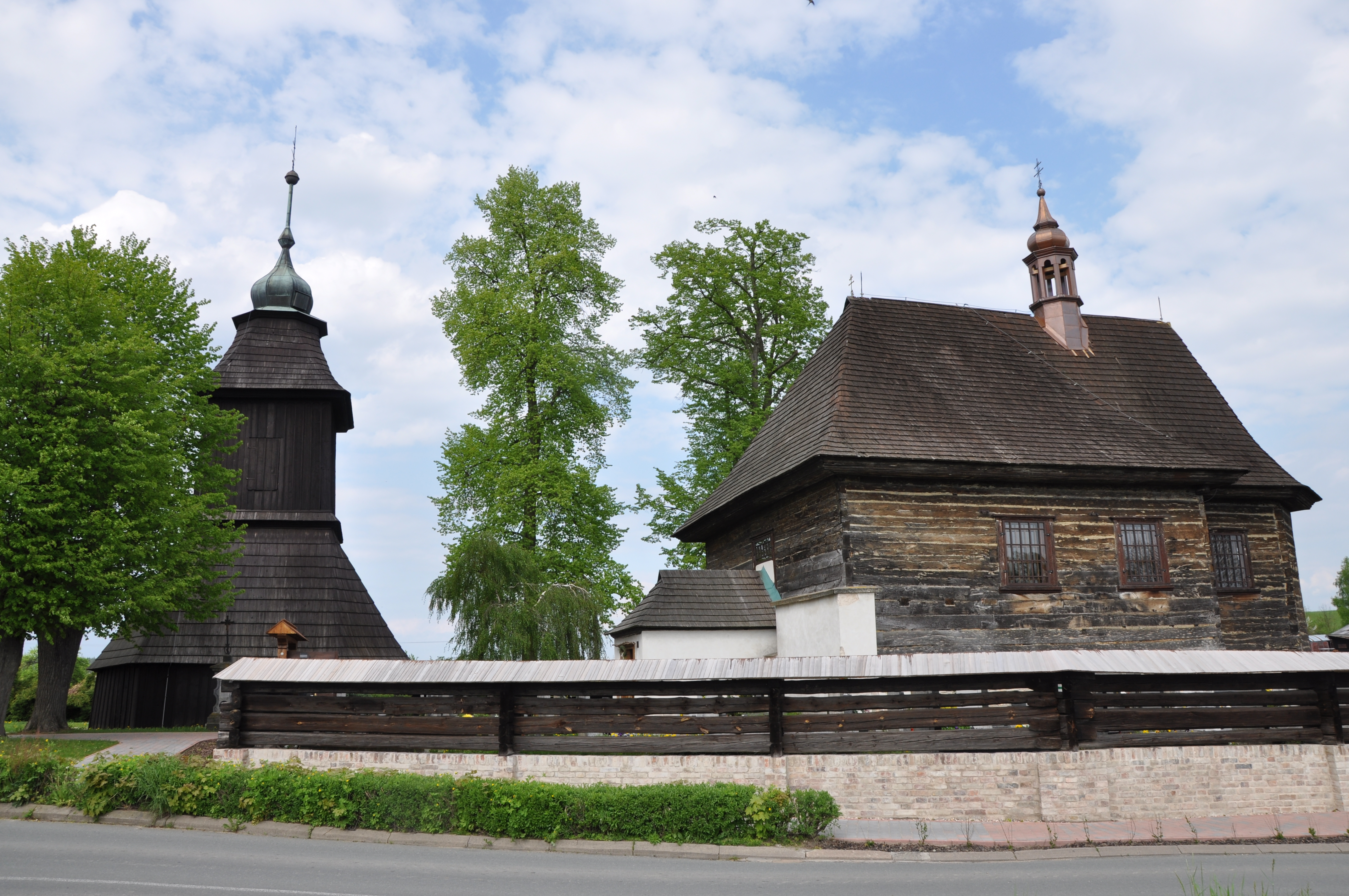 Veliny, okres Pardubice. Kostel svatého Mikuláše se zvonicí.